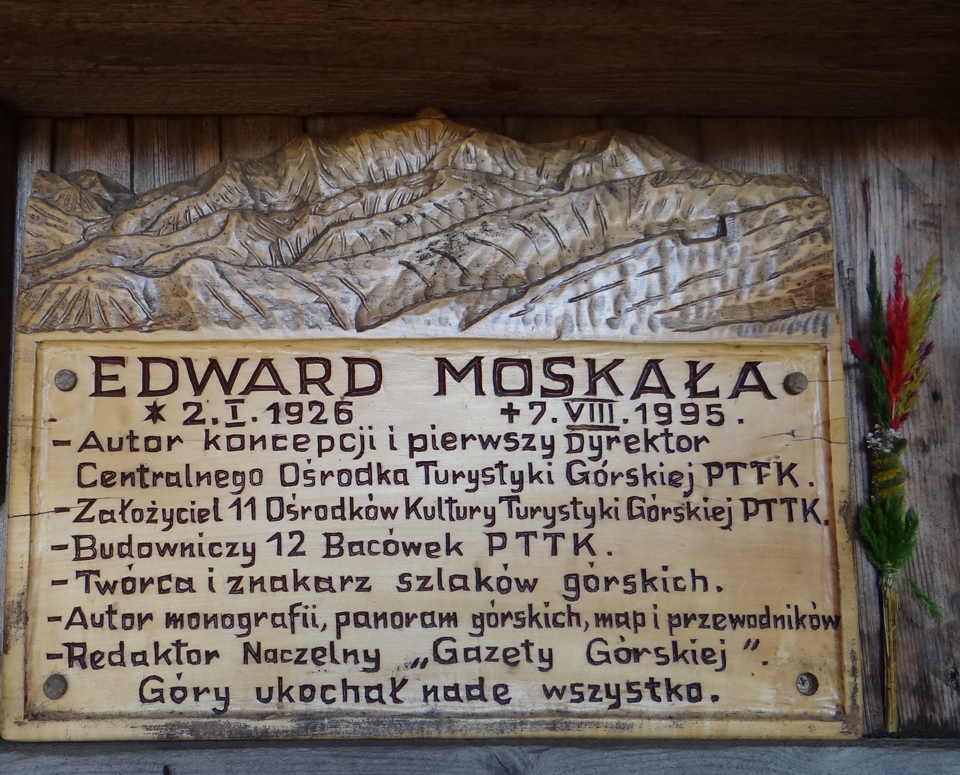 Jedna z tabliczek w Kaplicy Matki Boskiej Opiekunki Turystów na Okrąglicy